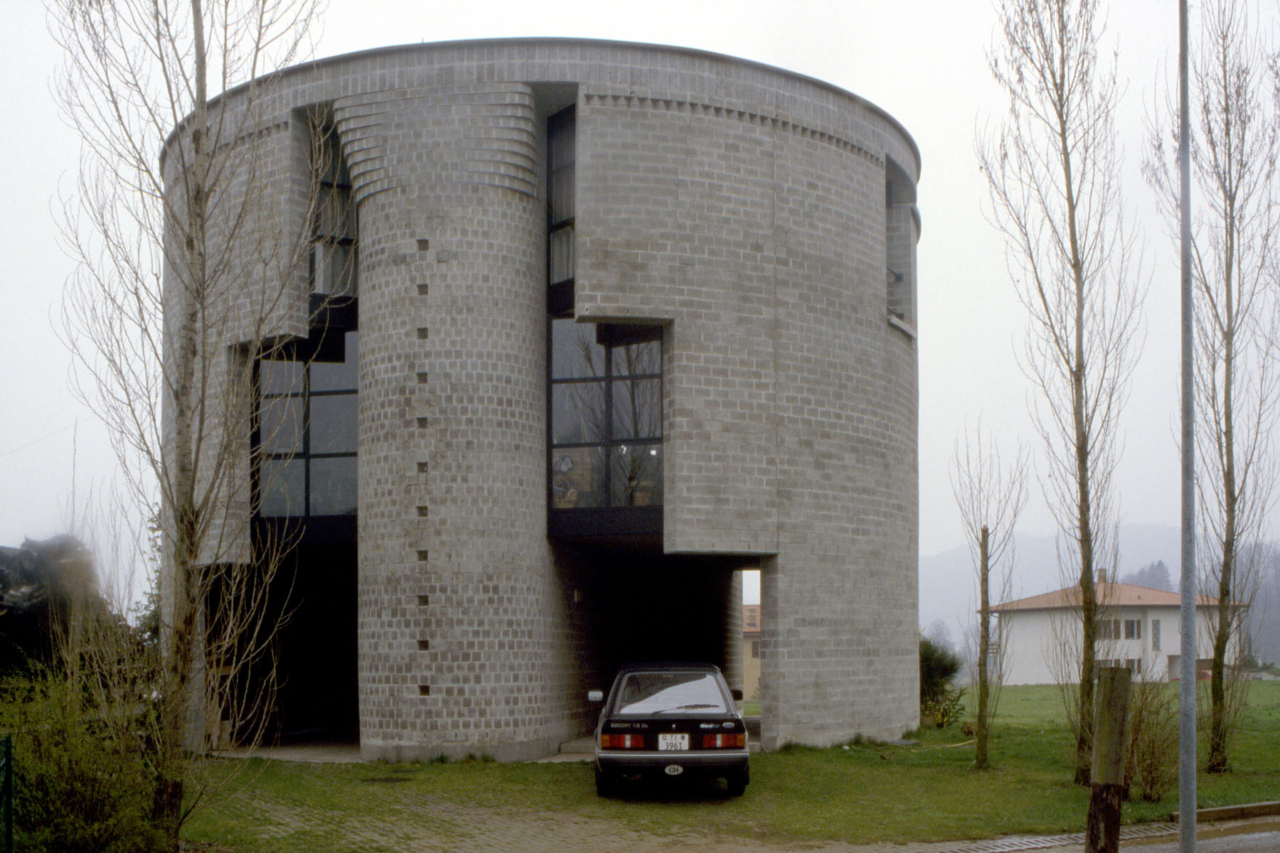 Stabio, Casa Medici (arch. Mario Botta 1980-82)